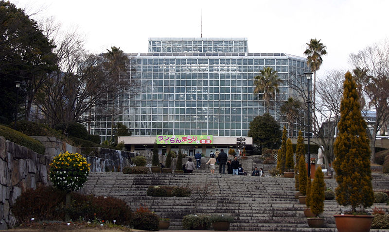 "Hiroshima Botanical Garden" Hiroshima, Japan 広島市植物公園